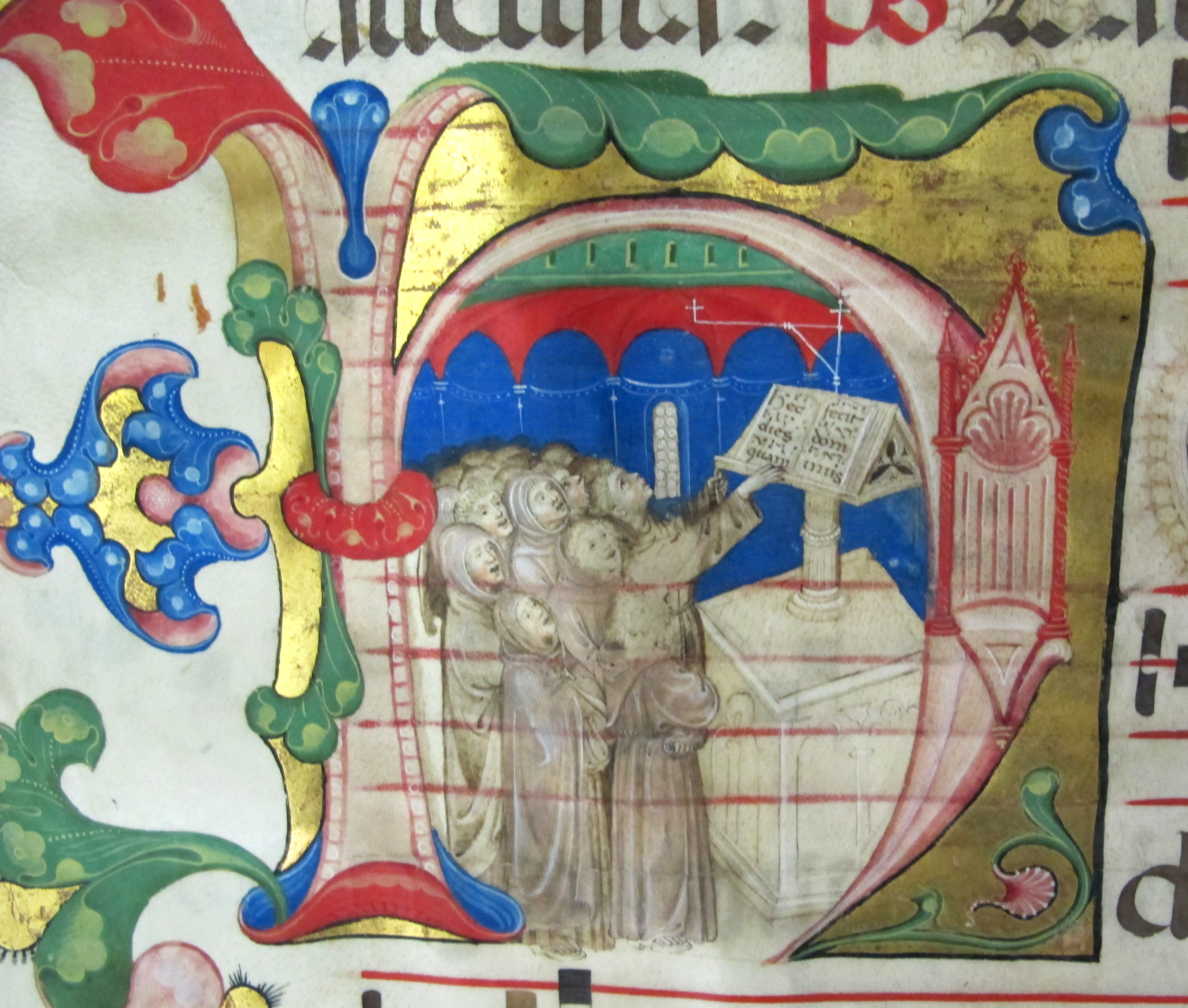 Biblioteca Malatestiana - MIBAC This is a photo of a monument which is part of cultural heritage of Italy.